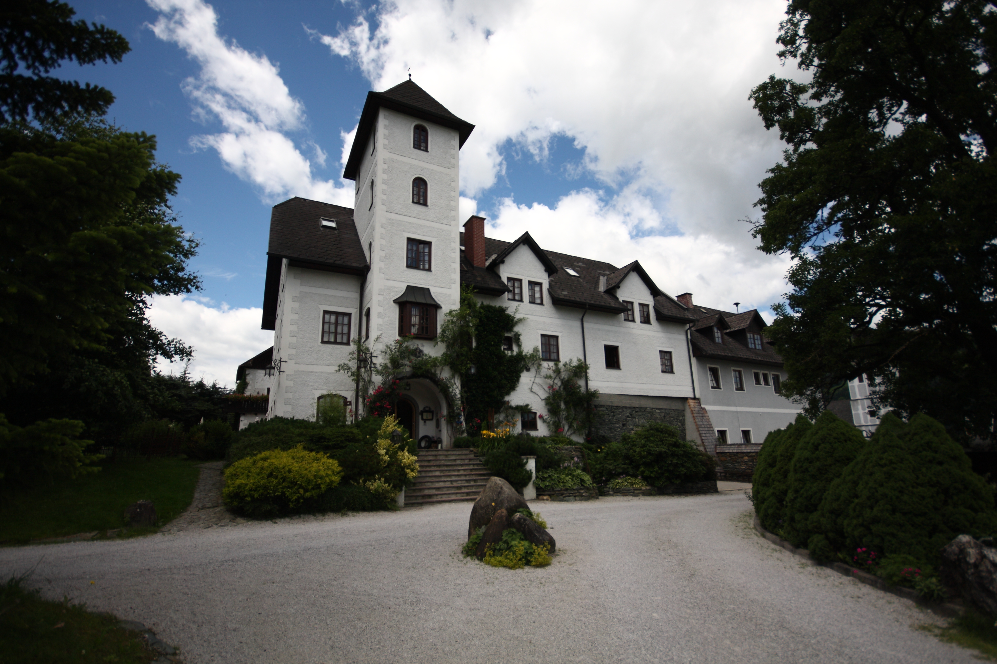 Schloss Moosheim (auch Thanneck oder Thonegg)